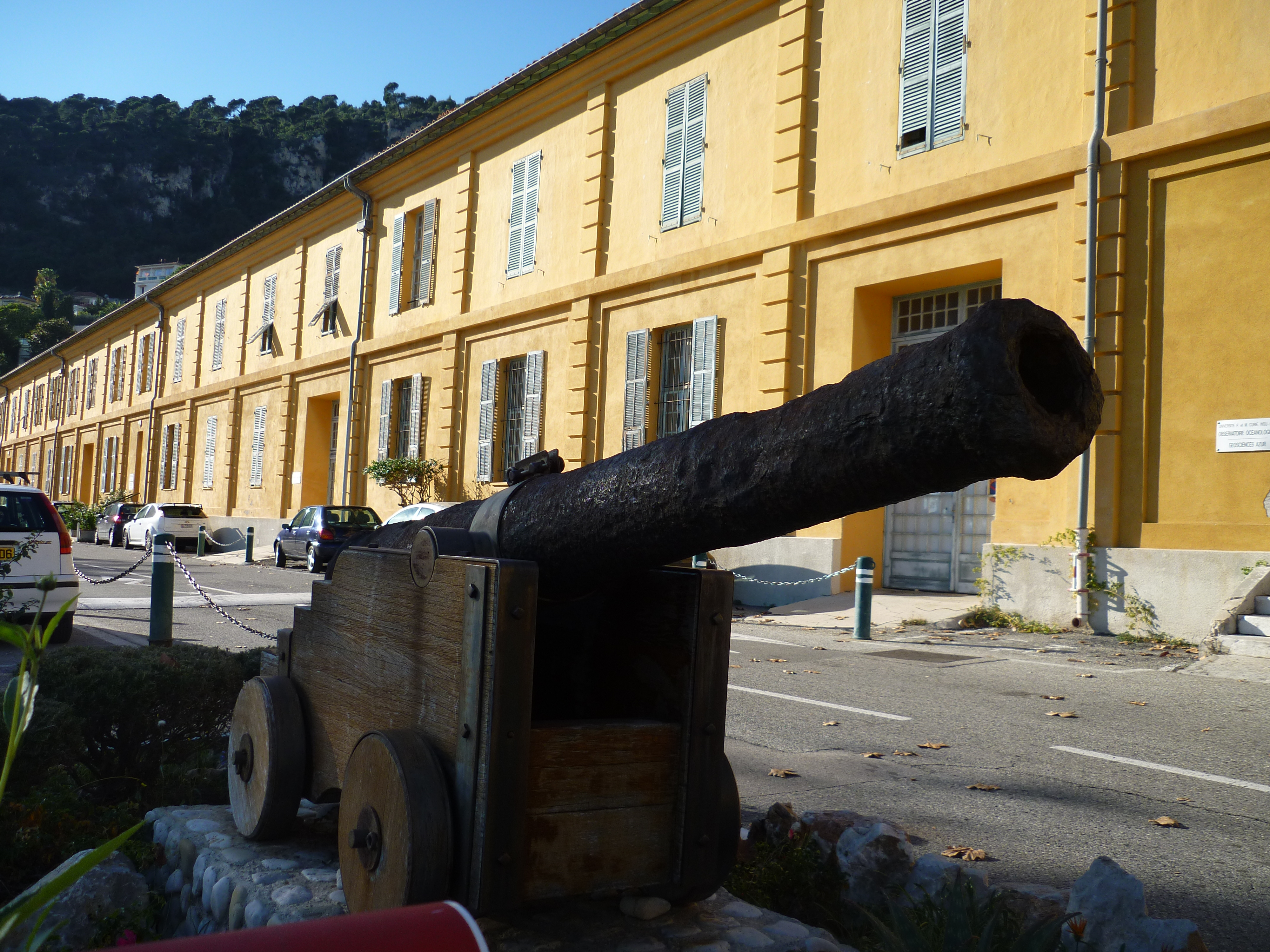 Darse de Villefranche-sur-Mer : Ancienne corderie, actuellement observatoire océanologique